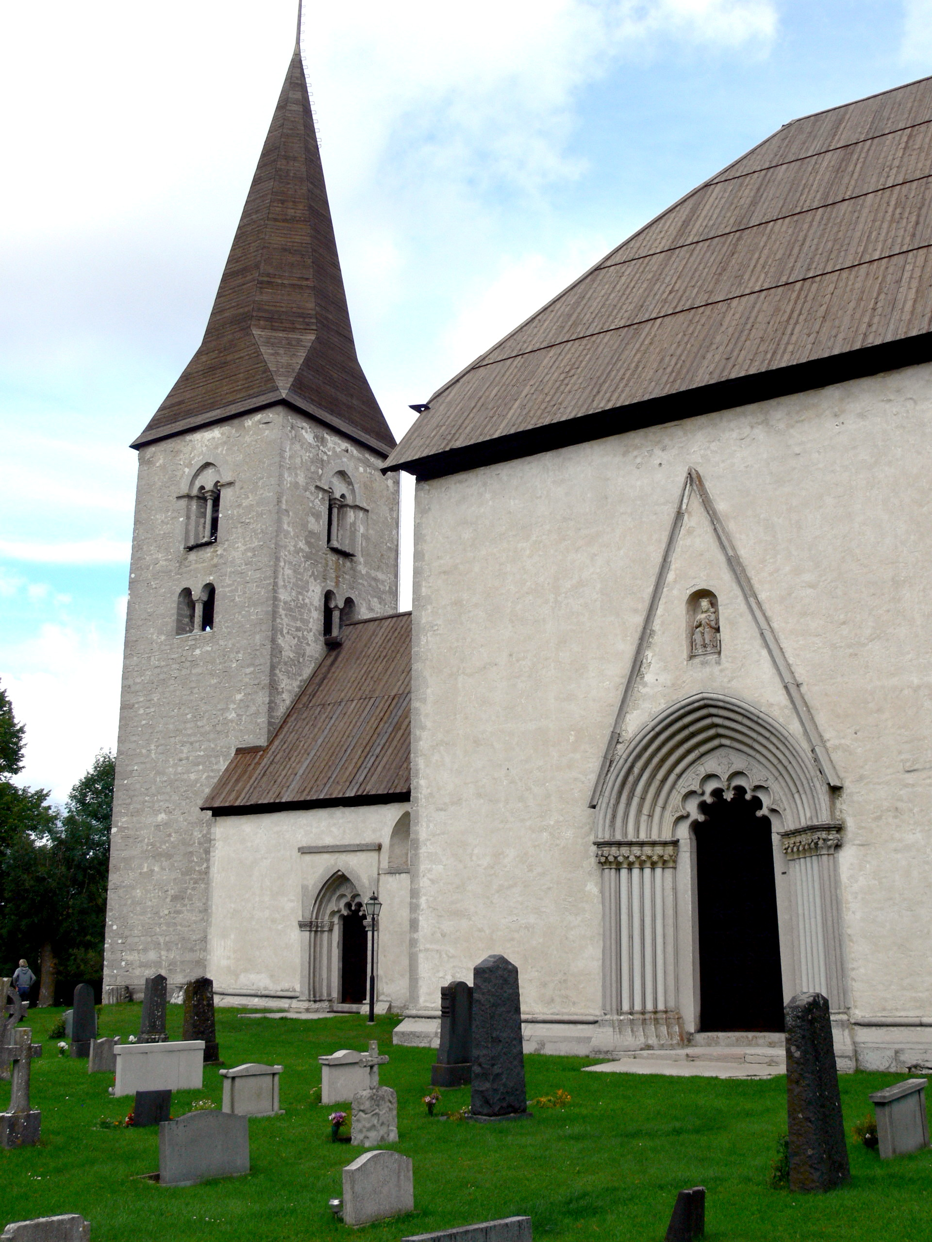 Källunge kyrka auf Gotland. Außenansicht